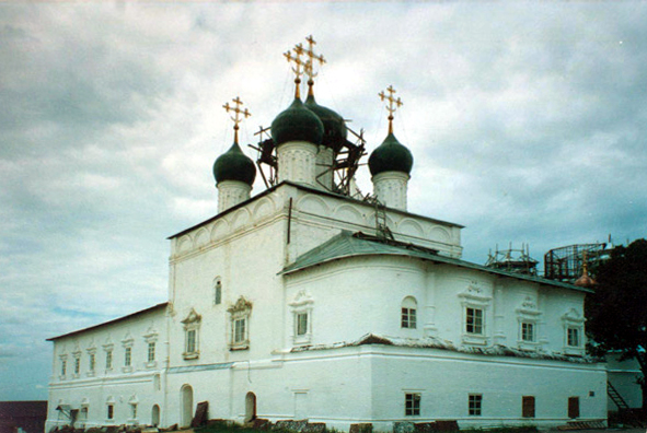 Храм Благовещения Пресвятой Богородицы (XVII век) Никитского мужского монастыря.